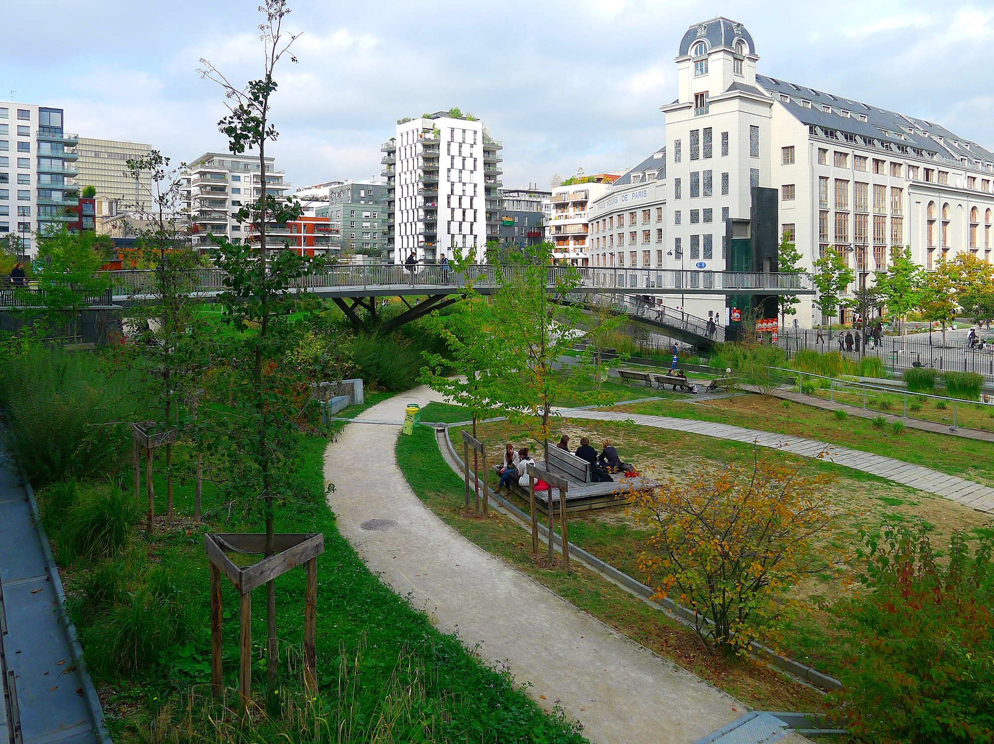 Jardins des Grands-Moulins - abbé-Pierre - Paris XIII